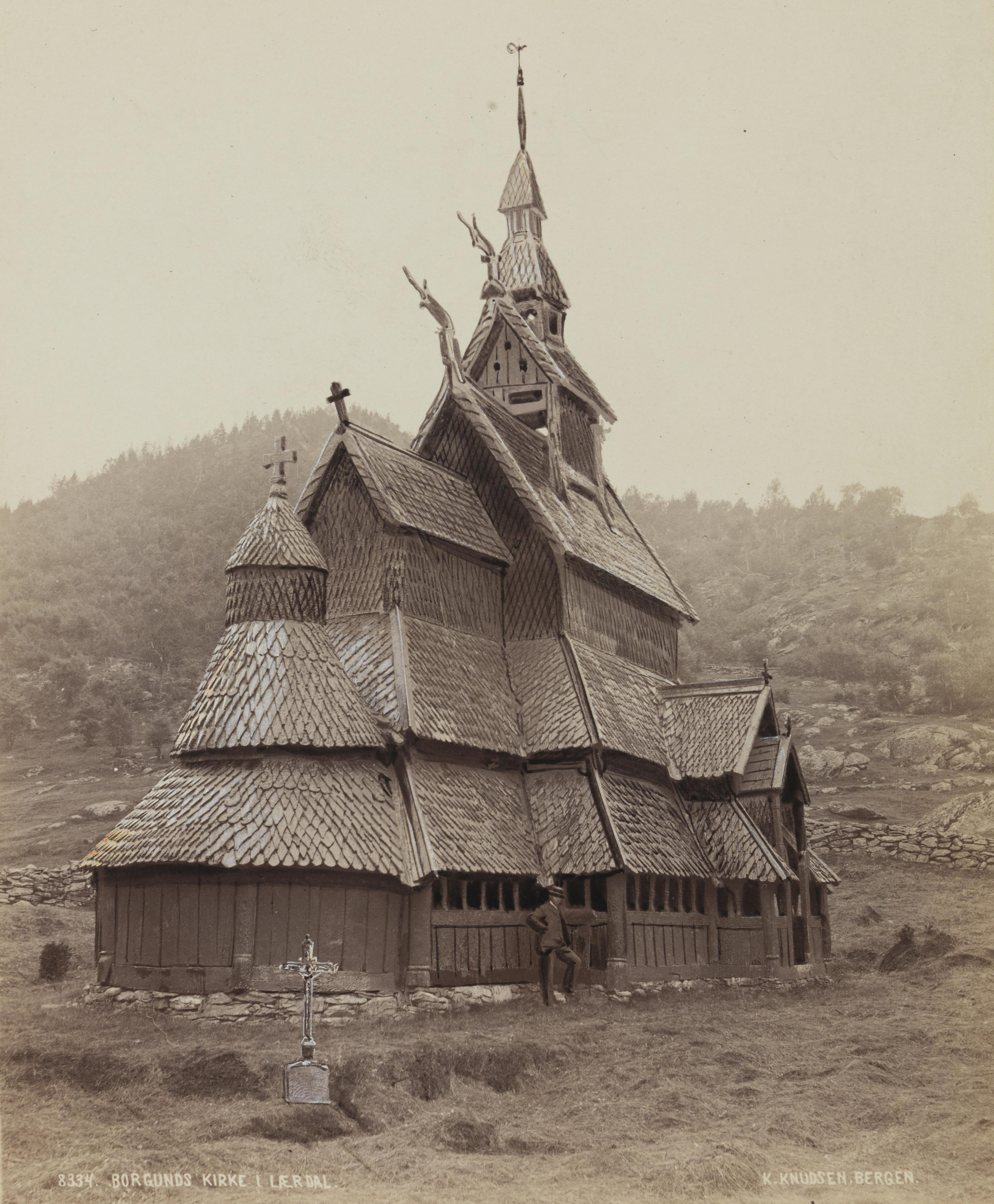 Bildet er hentet fra Nasjonalbibliotekets bildesamling Borgund stavkirke, Lærdal, Sogn og Fjordane